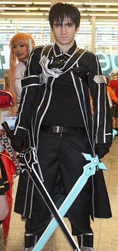 Otakuthon 2014: Cosplayer di Kirito, uno dei personaggi di Sword Art Online. Ritaglio di questa immagine.